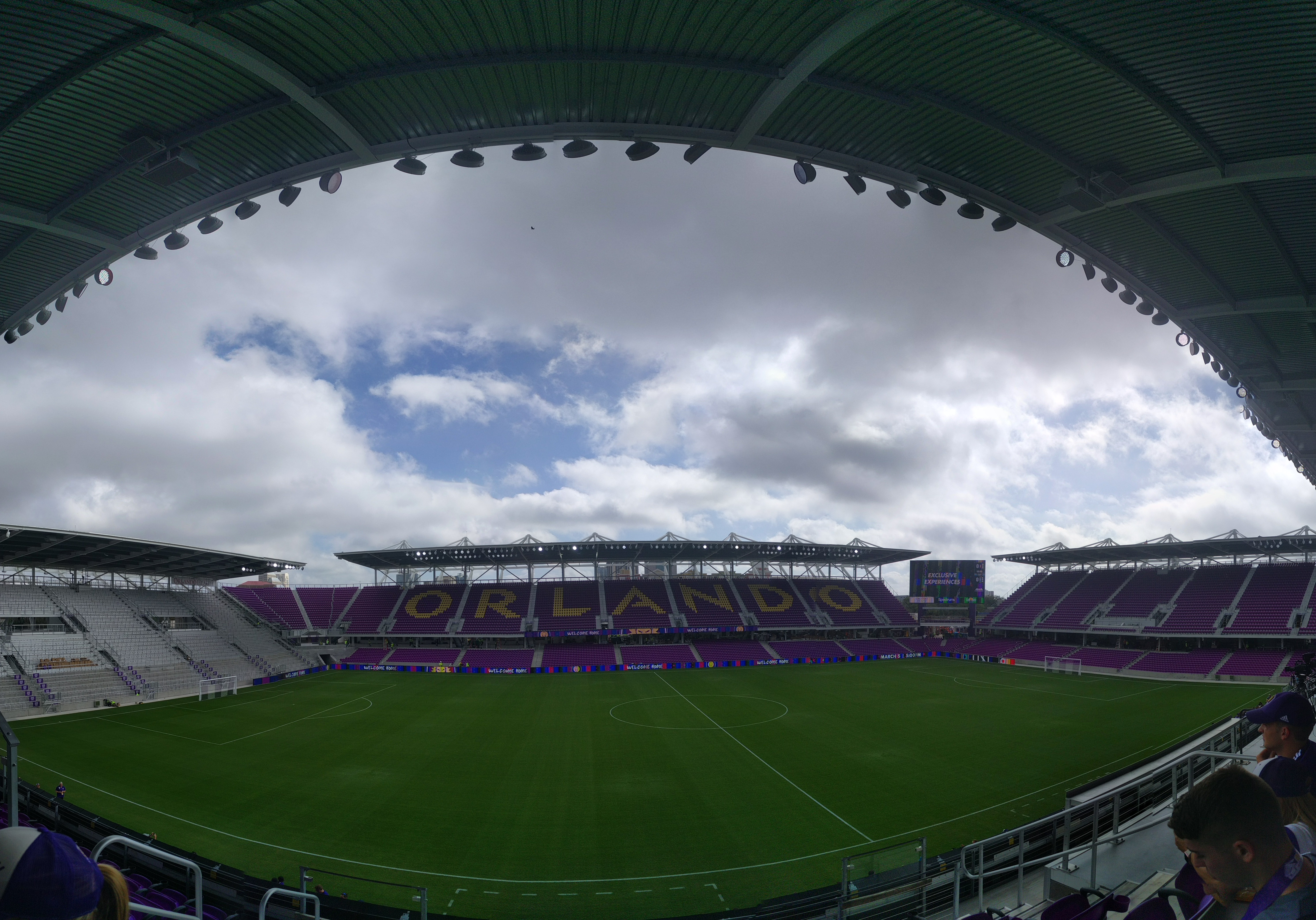 Open House Event